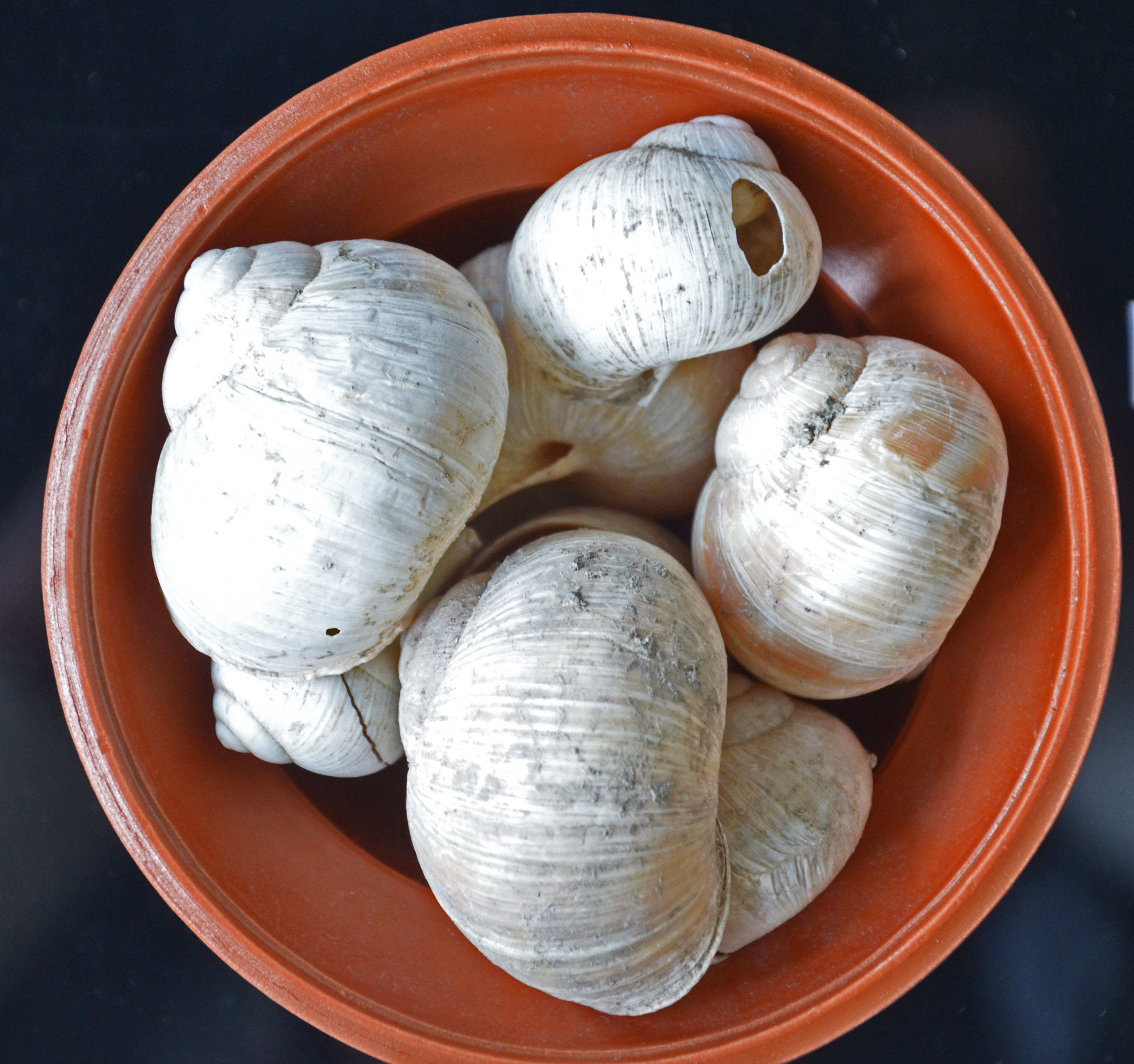 Escargots de Bourgogne datés de l'époque gauloise (supposés introduits dans le nord de la France à l'époque romaine) daté de l'époque gauloise. Photo prise lors d'une exposition publique intitulée "De la fouille au laboratoire", organisée par le "Learning Center archéologie/égyptologie de l'université de Lille 3", dans le hall du Conseil régional nord-Pas-de-Calais (2012)